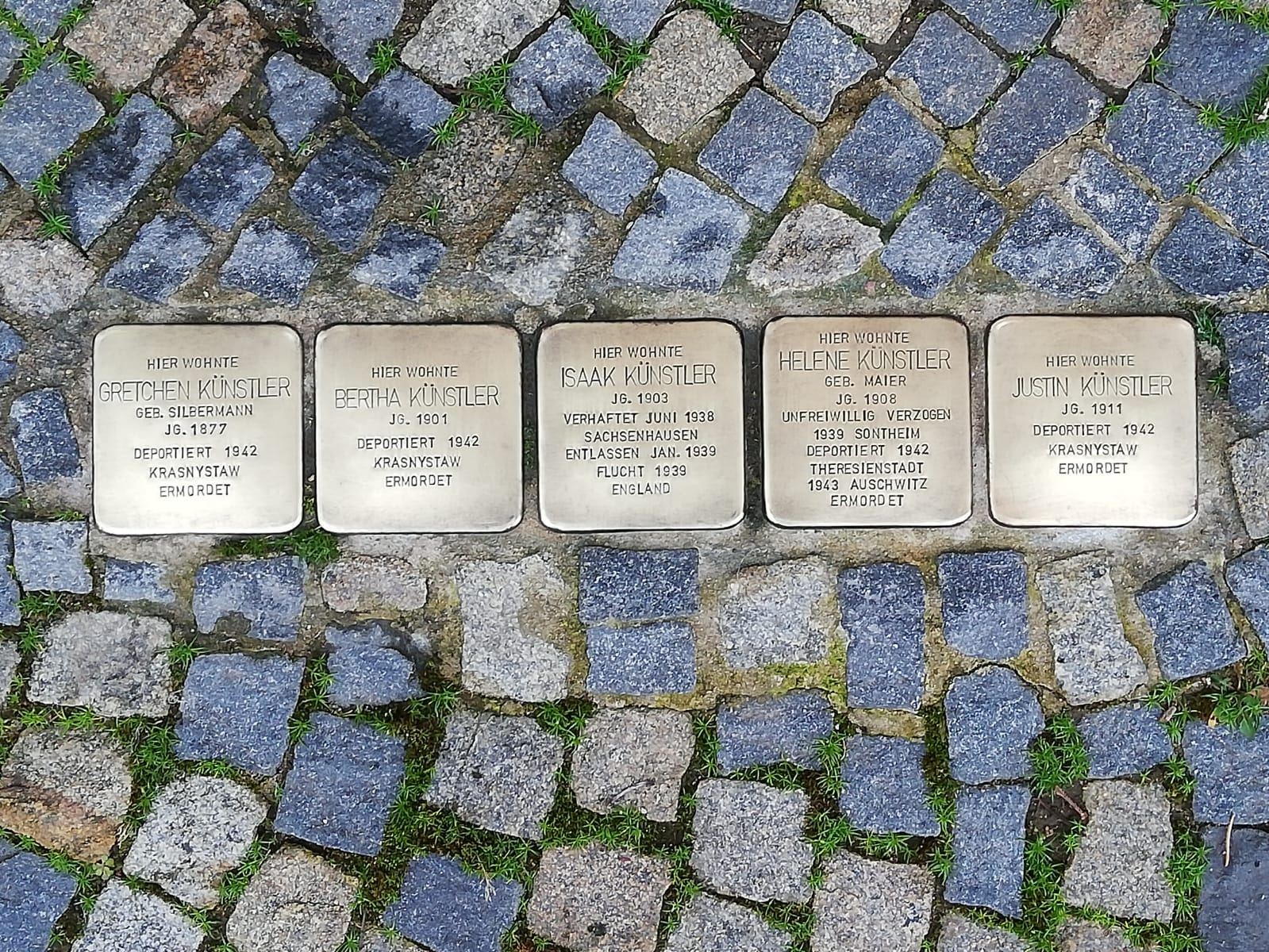 Stolpersteine, Familie Künstler, Karlsplatz 9, Prichsenstadt